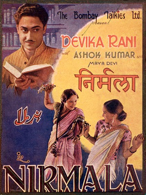 Nirmala (1938) booklet cover